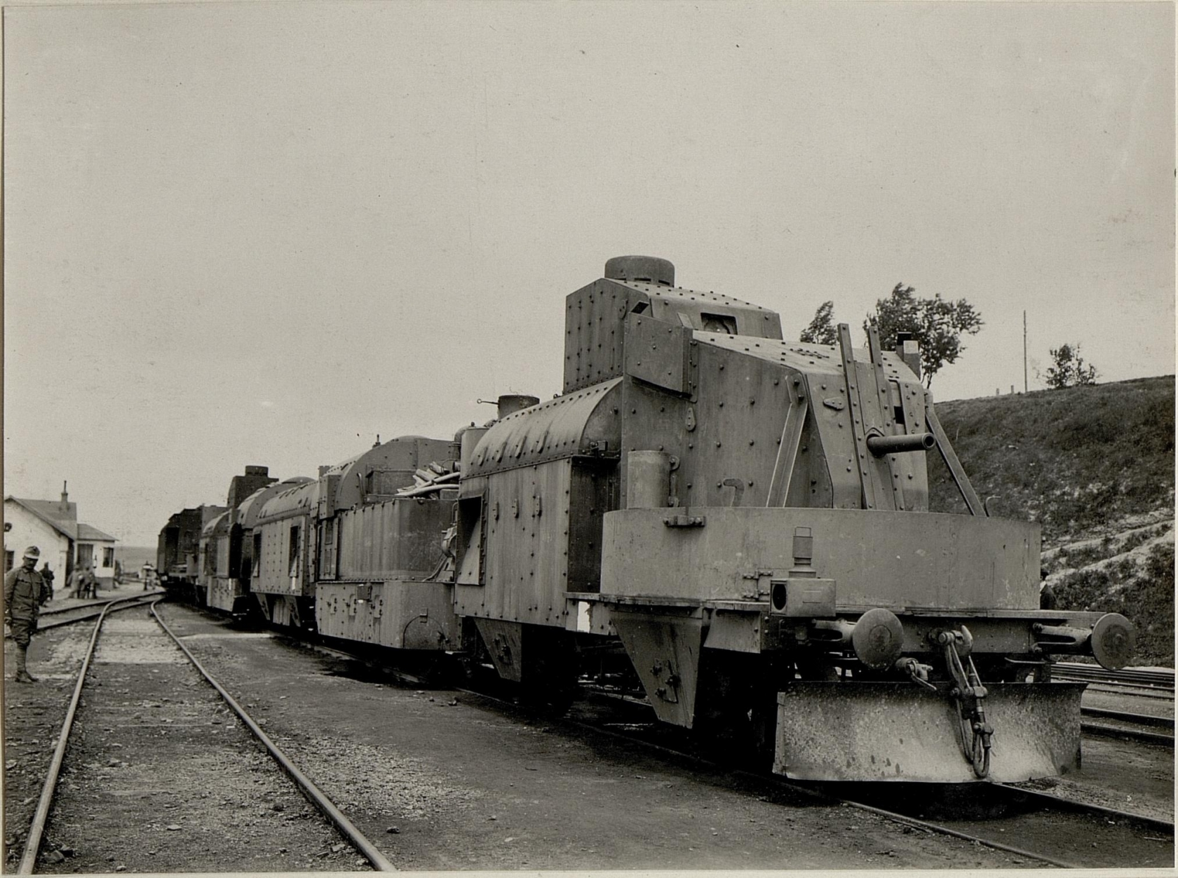 Ein mit Schnellfeuergeschützen und Maschinengewehren audgerüsteter Panzerzug der k.u.k.Staatsbahnen bei Zborow